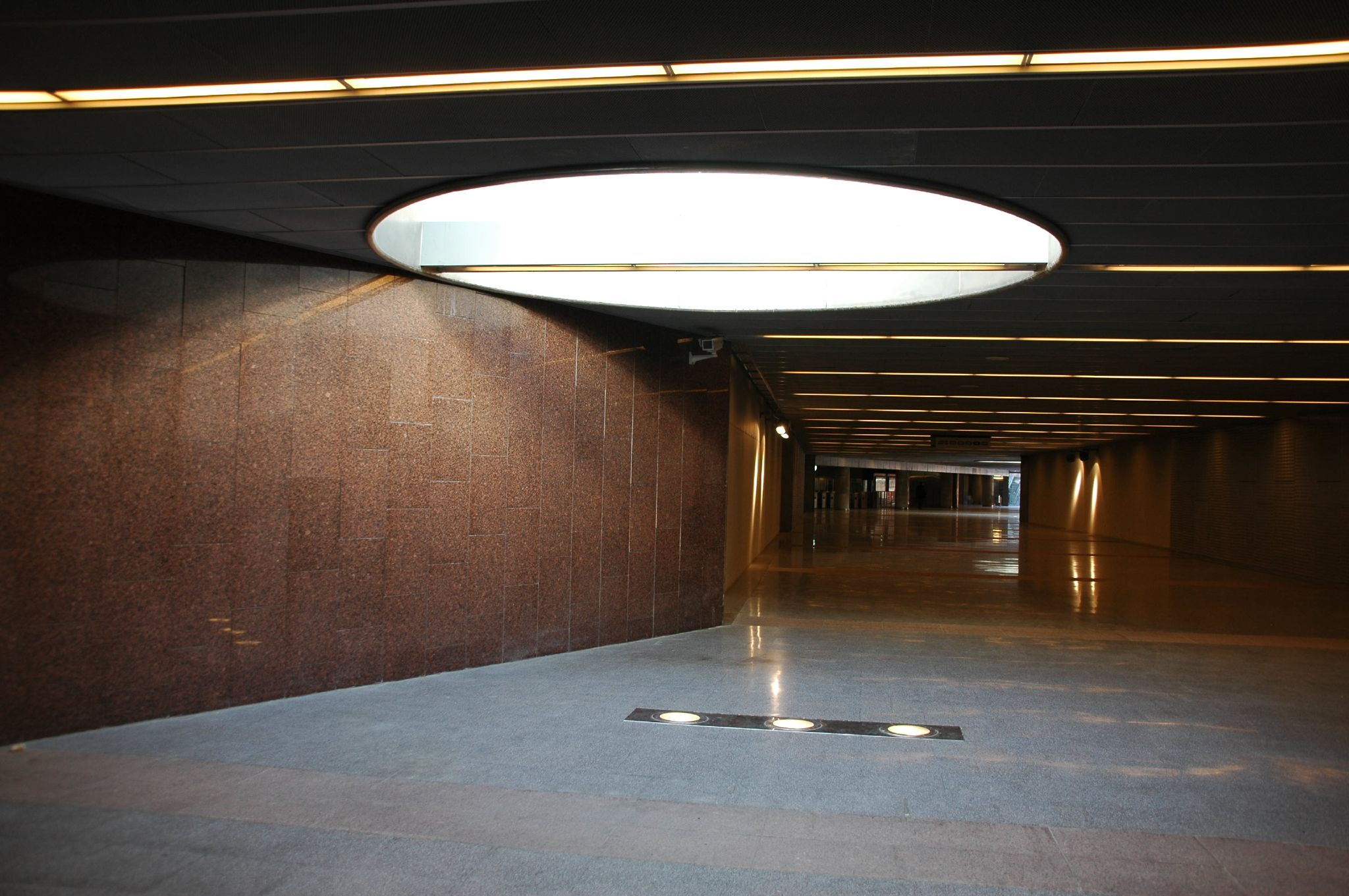 Estació d'Europa - Fira, a l'Hospitalet de Llobregat, dels Ferocarrils de la Generalitat. Vestíbuls enormes per viatgers fantasmes.